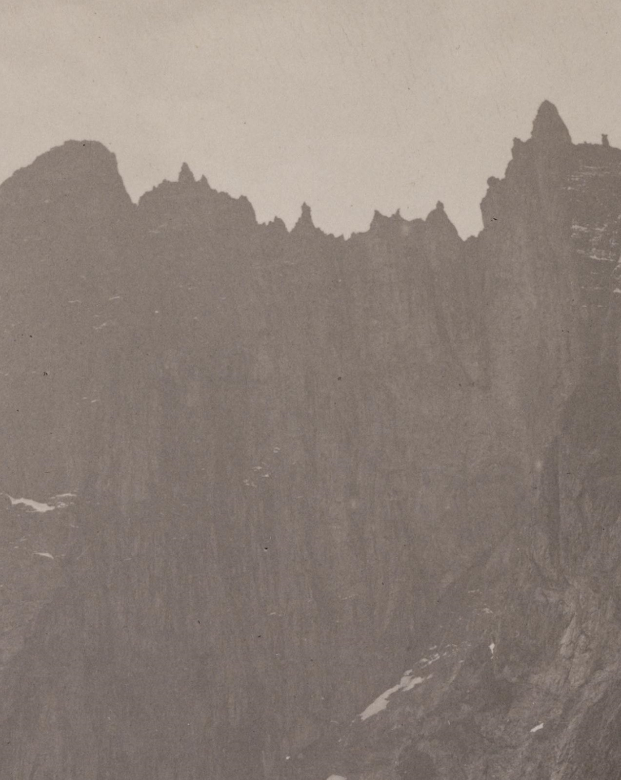 Bildet er hentet fra Nasjonalbibliotekets bildesamling. Beskåret for å fremheve Bruraskaret Romsdalshorn, Rauma, Møre og Romsdal